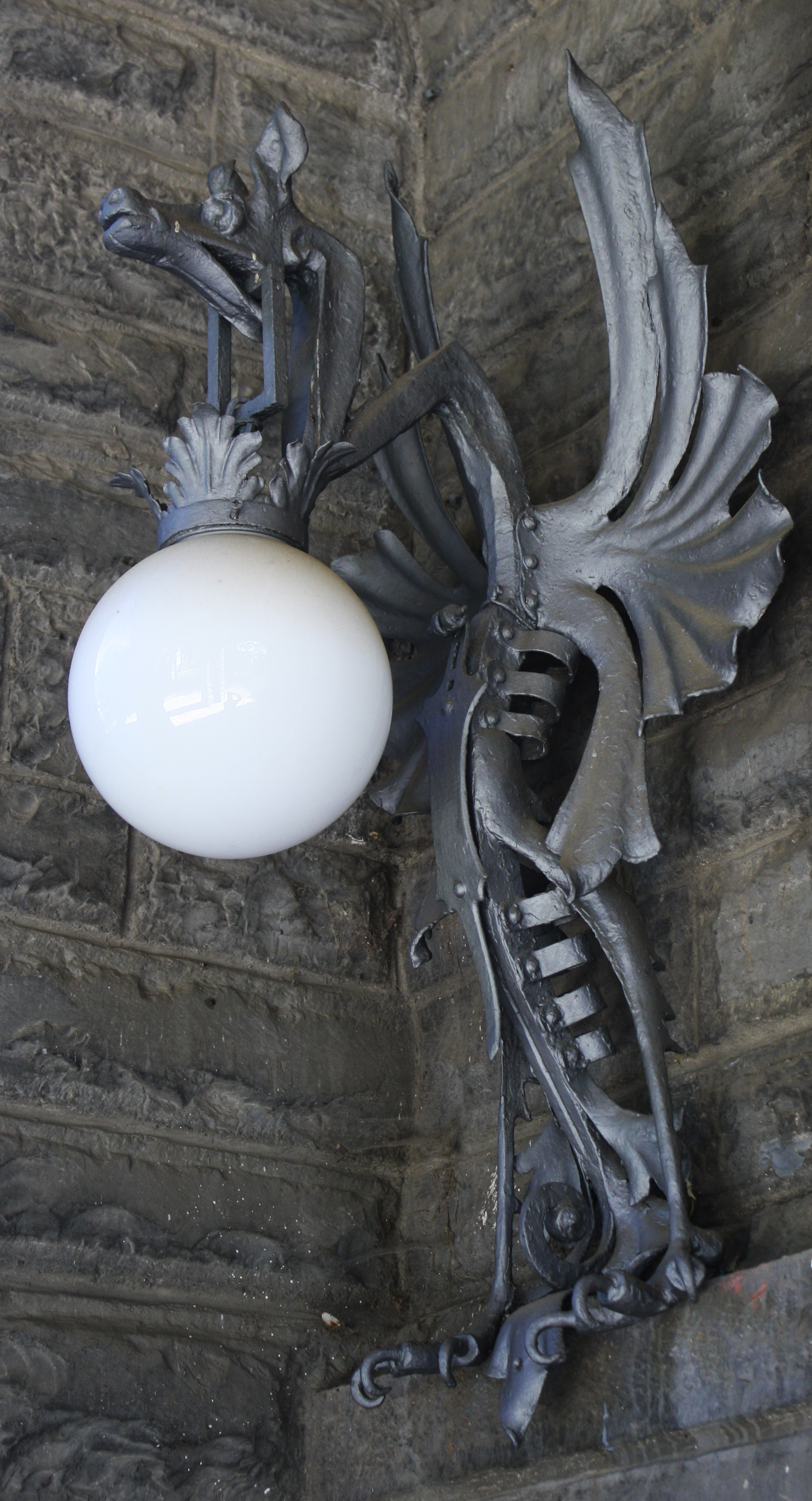 Lampione posto sotto il porticato settentrionale della villa Ottolini-Tosi a Busto Arsizio. Ferri battuti di Alessandro Mazzuccotelli che raffigurano un drago. This is a photo of a monument which is part of cultural heritage of Italy.